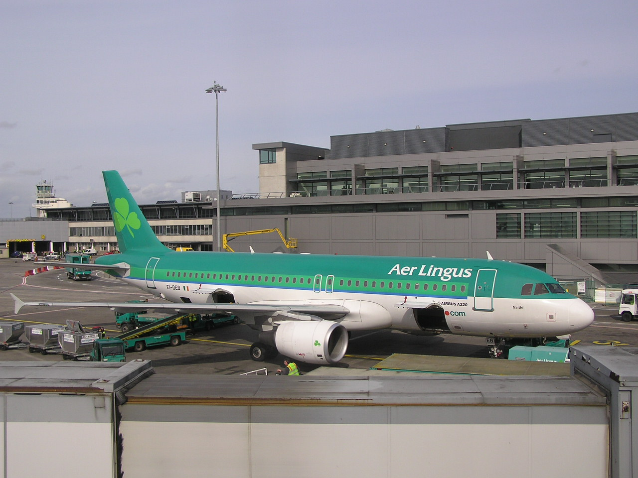 Ein Airbus A320 der Aer Lingus auf dem Flughafen Dublin